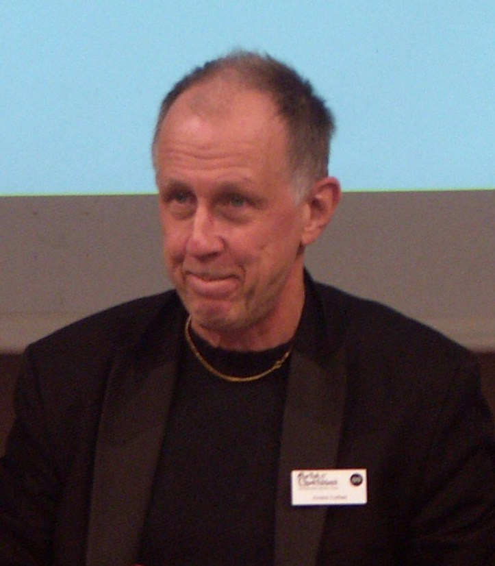 Anders Cullhed, professor i litteraturvetenskap vid Stockholms universitet.